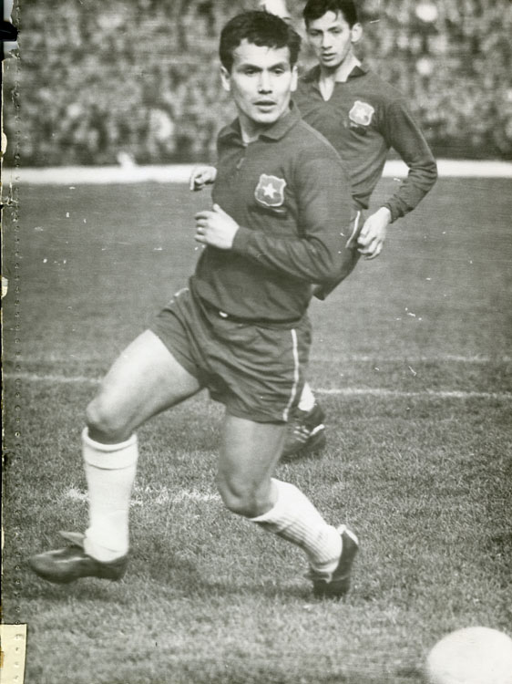 Aldo Valentini jugador de la Selección Chilena, 1966